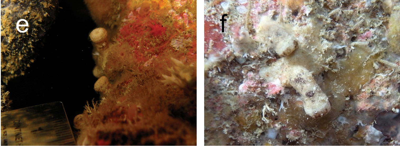 e P. umbrosa; pólipos cerrados. 2009, en Lyudao, Taiwan f P. umbrosa, pólipos cerrados. 2012, en isla Sotobanari, Islas Yaeyama, Japón.